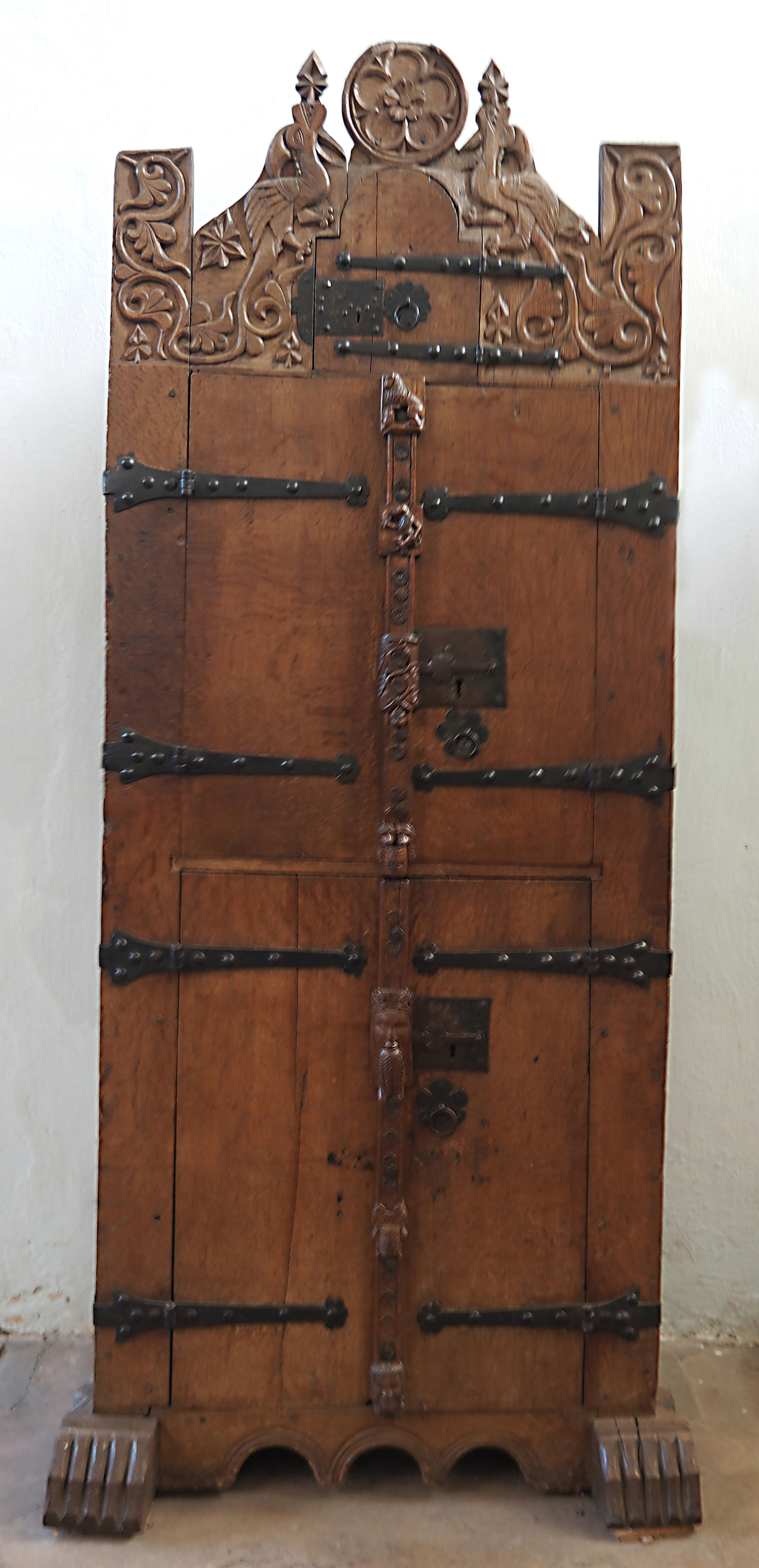 Eichenbohlenschrank in der St. Sylvestri-Kirche, Wernigerode (frühes 13. Jahrhundert)